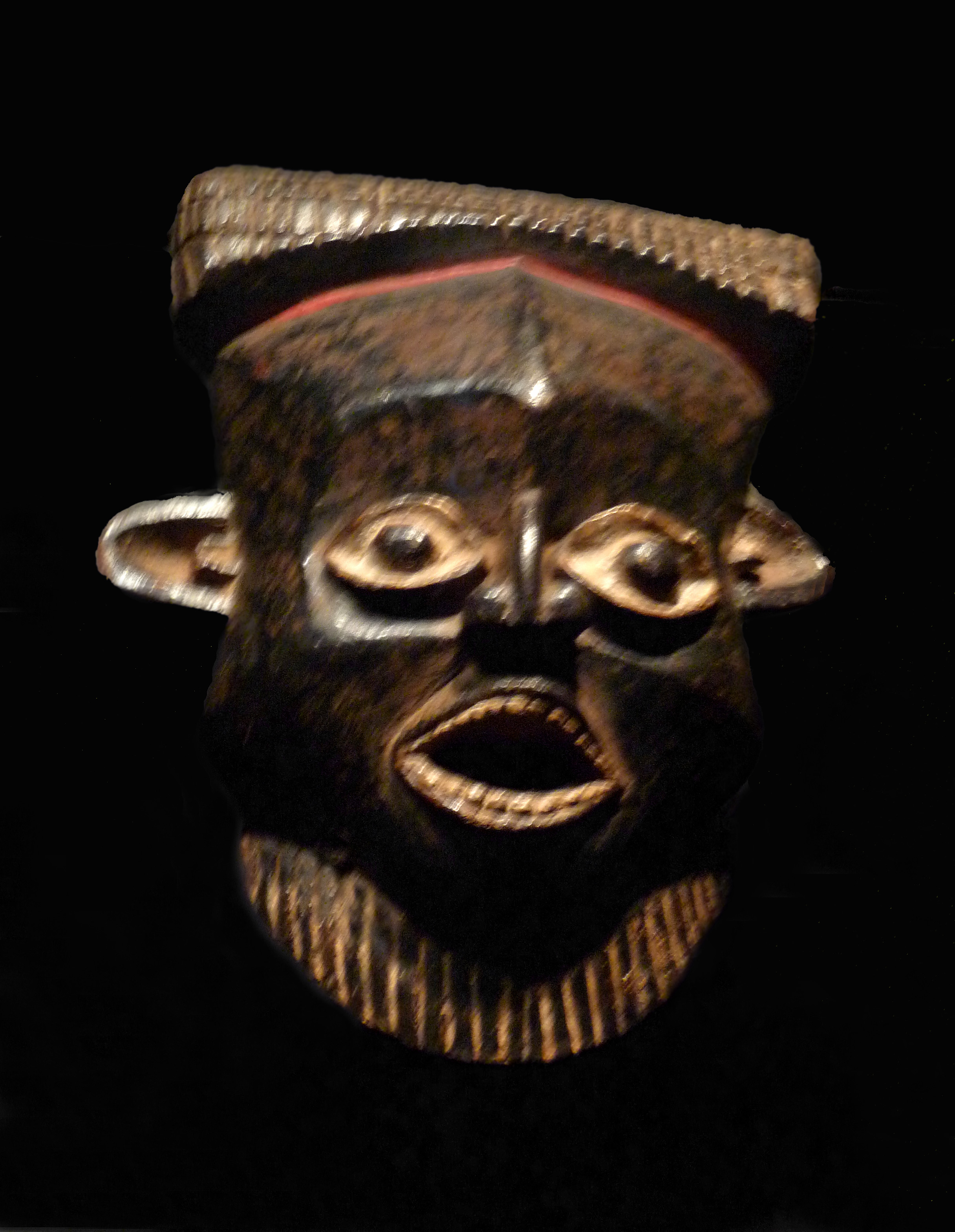 Wum : masque de danse akam. Cameroun, région de Wum. 19e-20e s. Bois, pigments. Musée du quai Branly